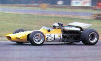 Prototipo Berta Tornado de F-1 Argentina. Piloto: Jorge Ternengo